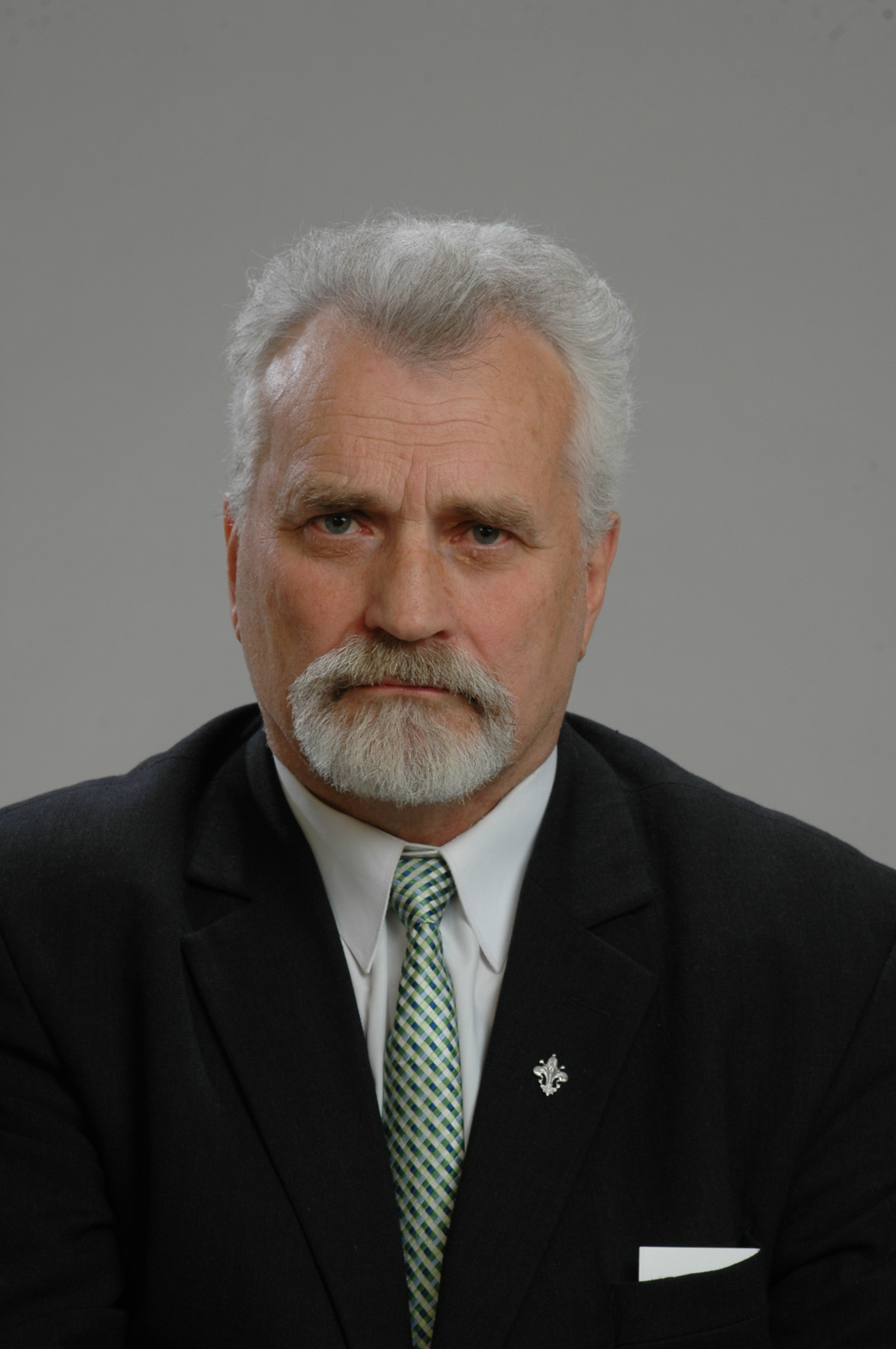 Foto: Saeima